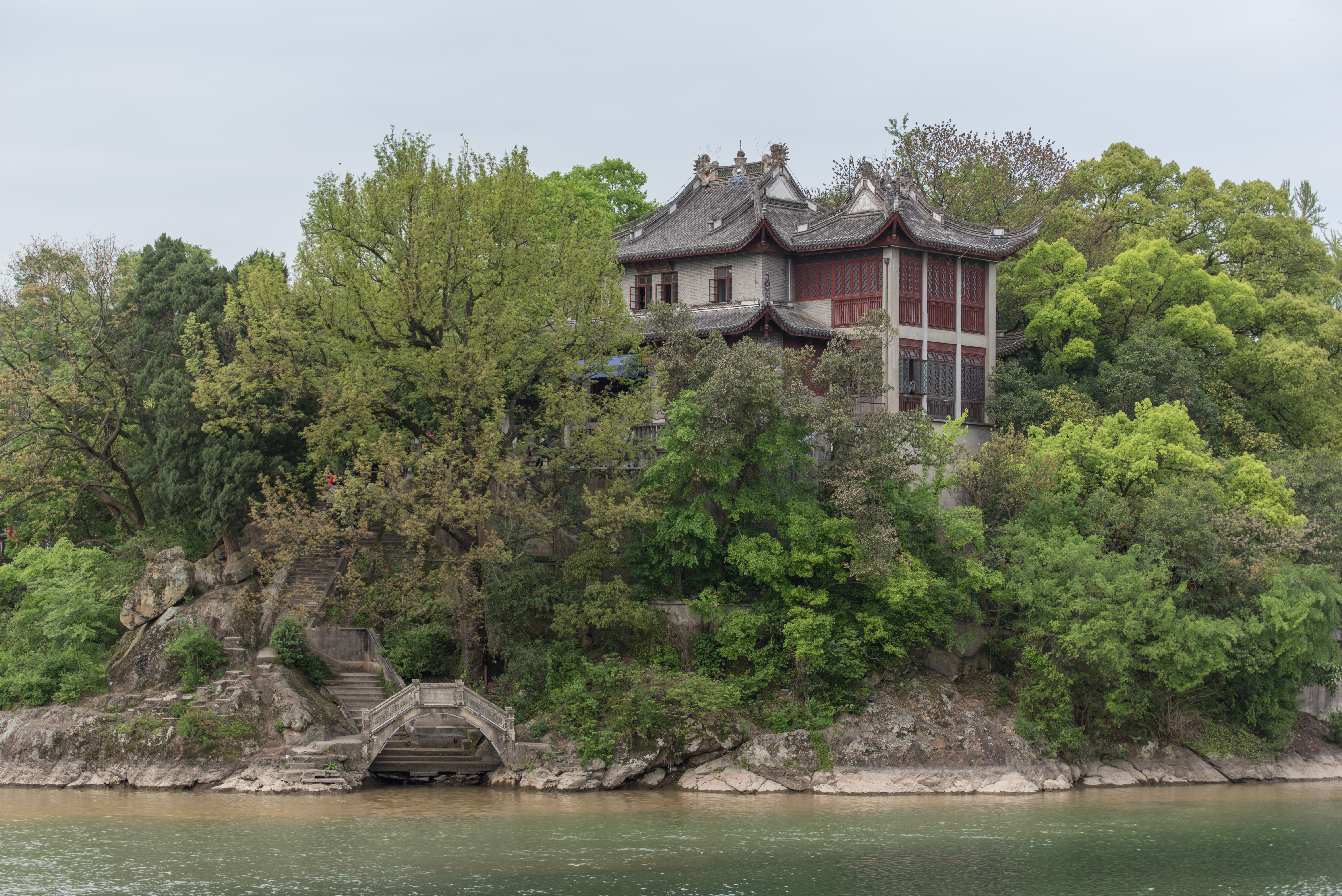 奉化溪口文昌阁